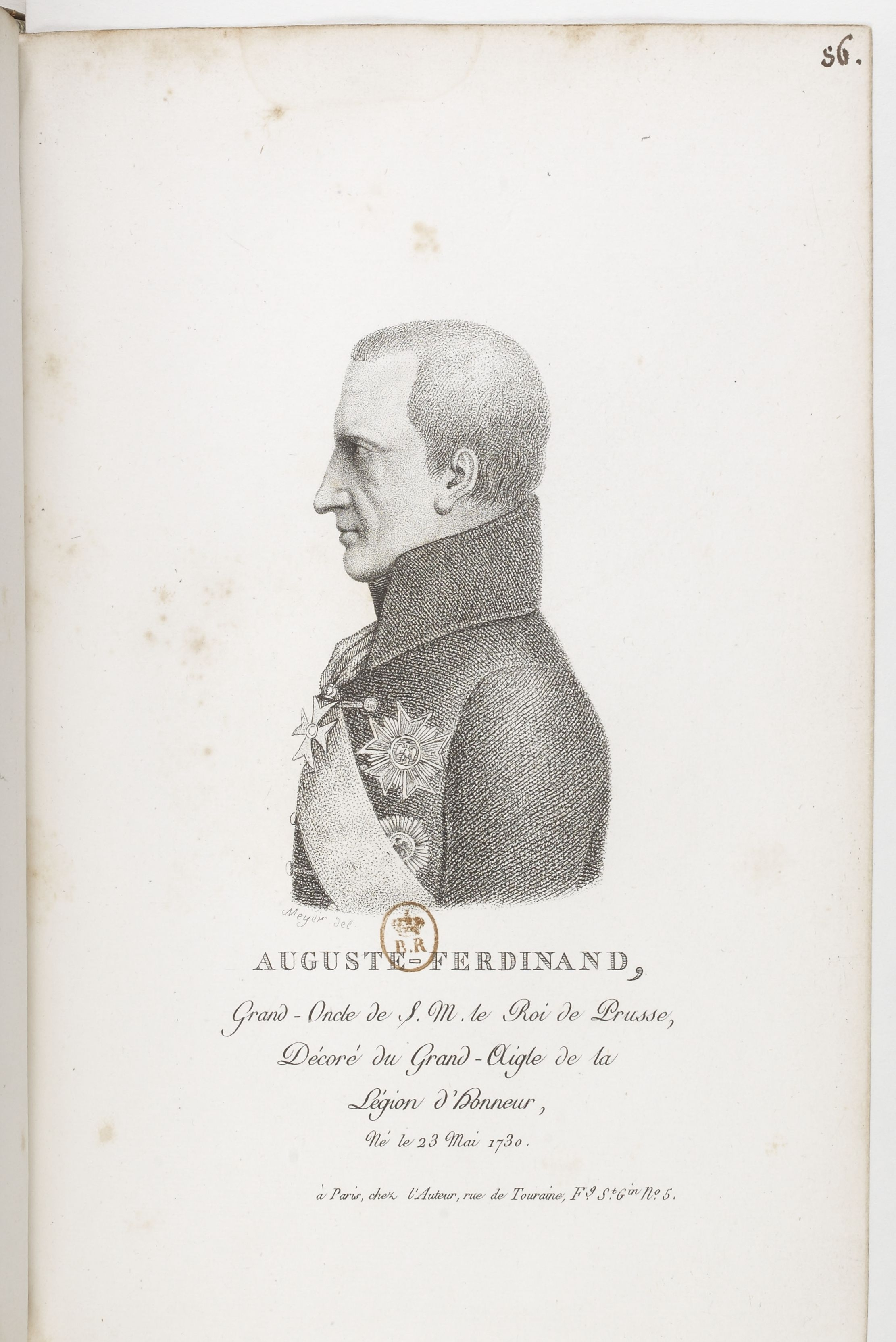 Collection complète des portraits des Grands-Aigles et des Grands-Officiers de la Légion d Honneur... / publiée par... Meyer, peintre... : vue 70 - Auguste-Ferdinand [de Prusse]